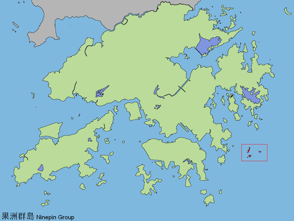 中文（香港）: 果洲群島。